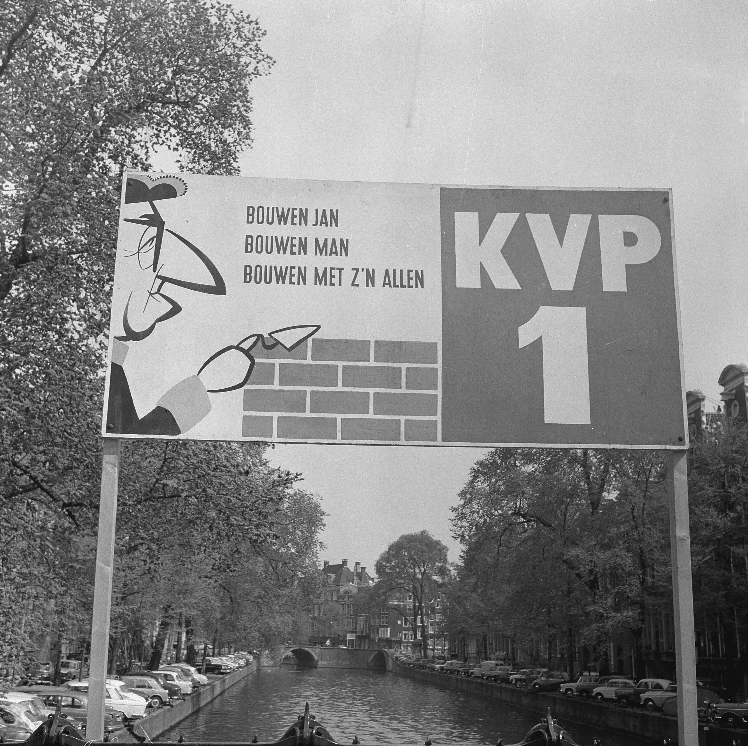 Collectie / Archief : Fotocollectie Anefo Reportage / Serie : [ onbekend ] Beschrijving : Tweede Kamerverkiezing , verkiezingsbord KVP Datum : 8 mei 1963 Trefwoorden : verkiezingen, verkiezingsborden Instellingsnaam : KVP Fotograaf : Nijs, Jac. de / Anefo Auteursrechthebbende : Nationaal Archief Materiaalsoort : Negatief (zwart/wit) Nummer archiefinventaris : bekijk toegang 2.24.01.03 Bestanddeelnummer : 915-1327